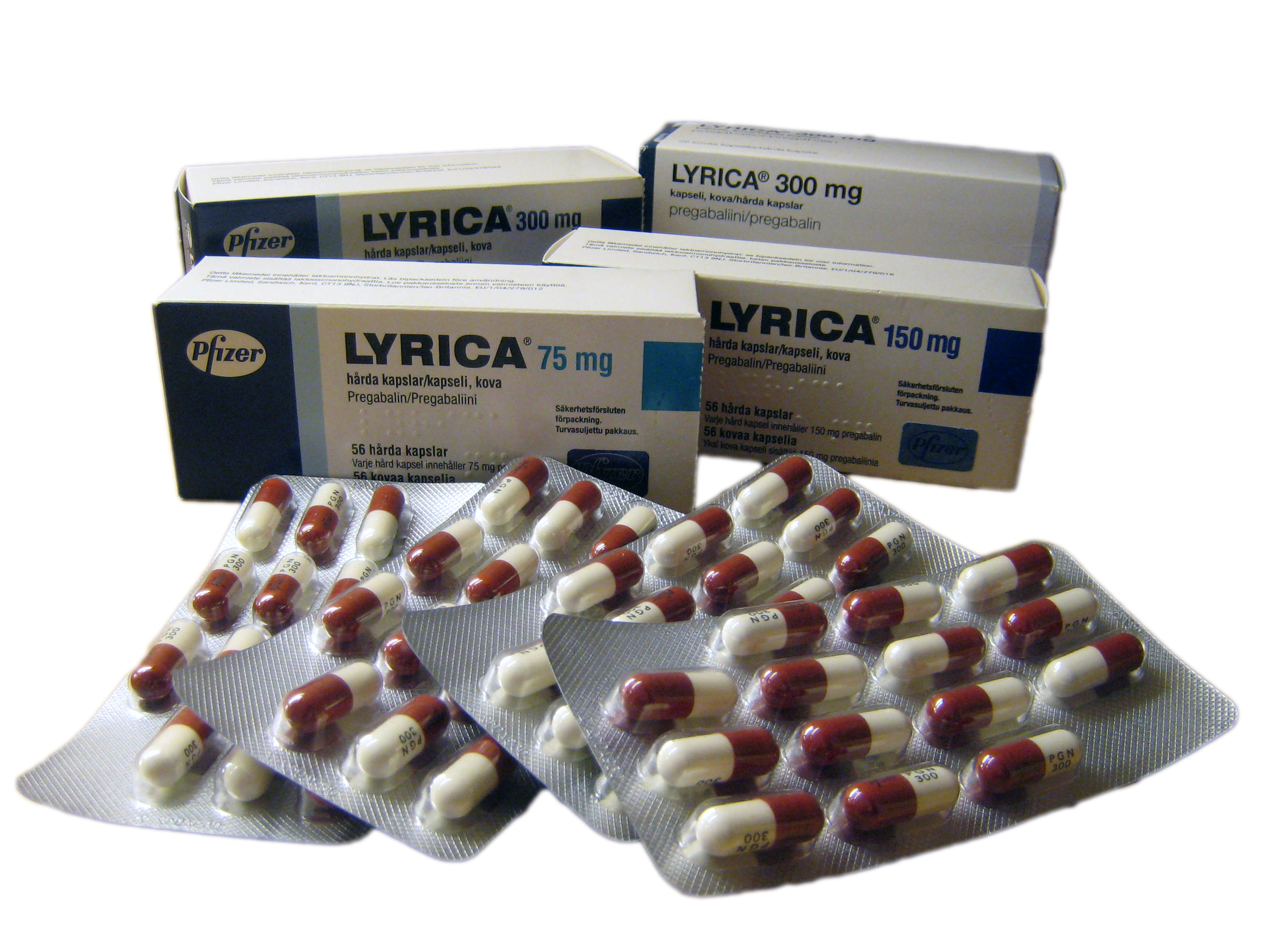 Lyrica-lääkkeen myyntipakkauksia